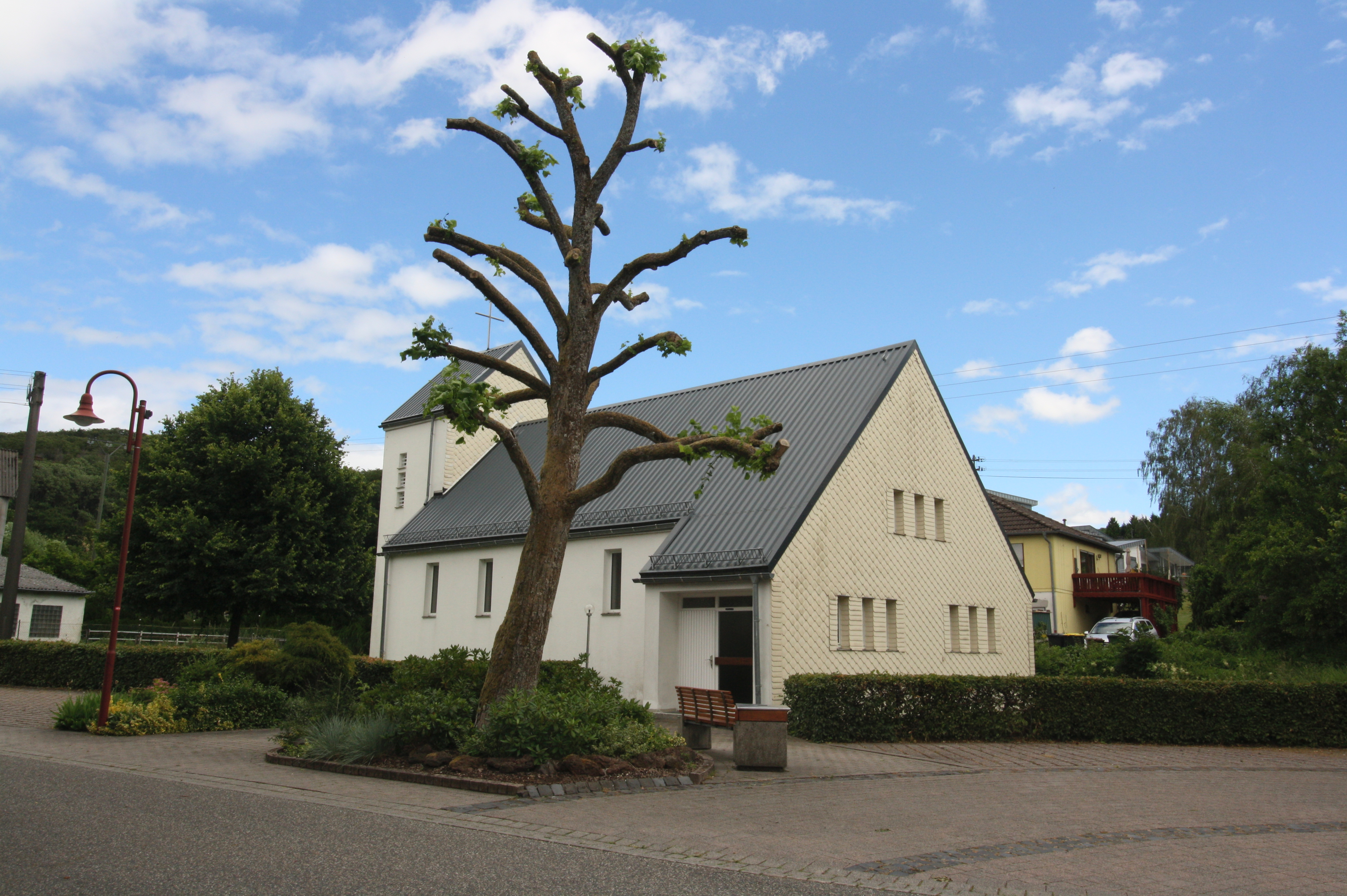 Kapelle Mutterschaft Mariens, Sainerholz, Ortsteil von Ötzingen, Westerwald, Rheinland-Pfalz, Deutschland